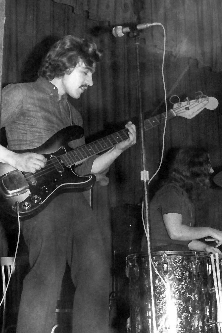 ARRELS. Pere Vidal Molins